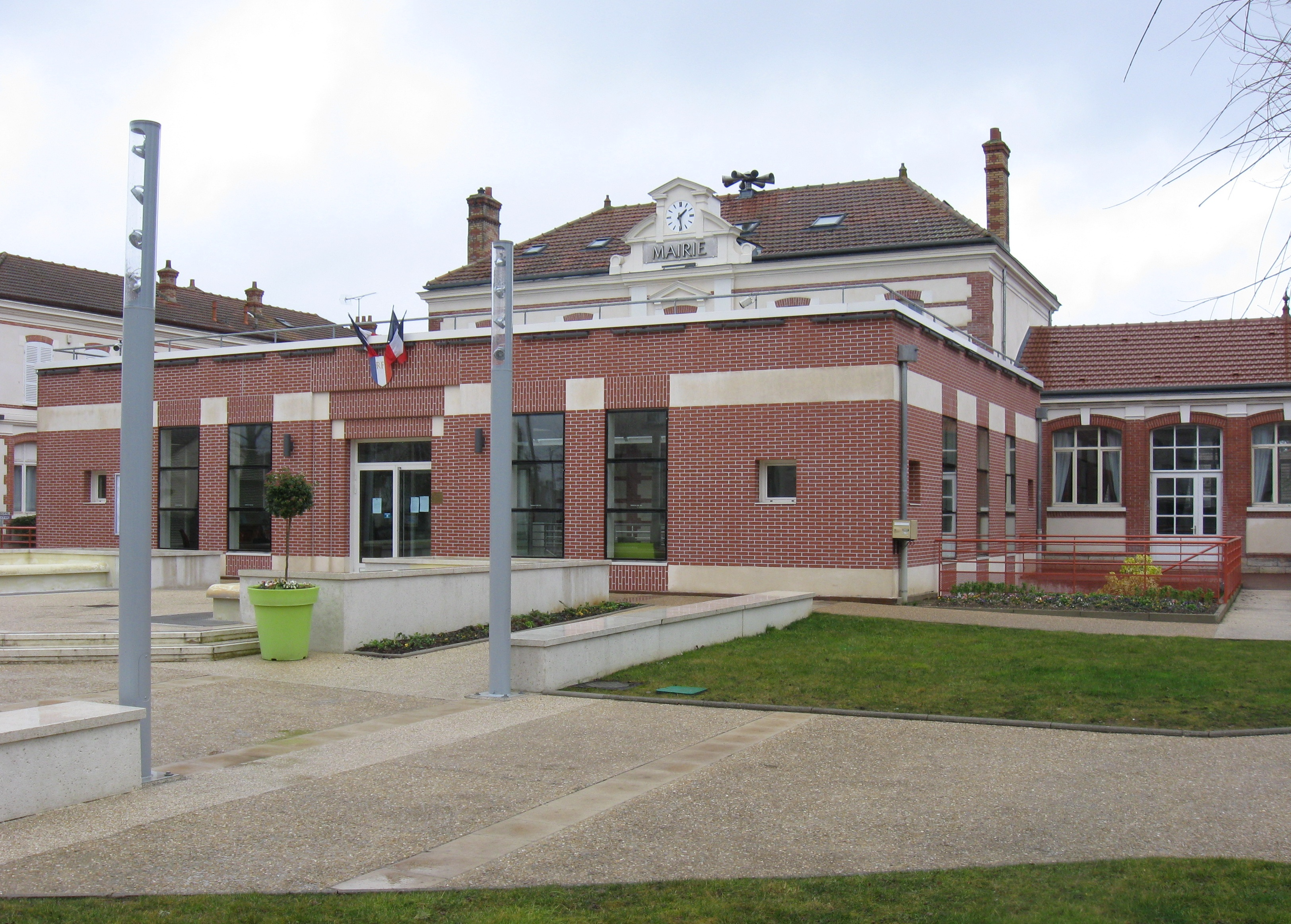 Mairie de Varennes-sur-Seine. (Seine-et-Marne, région Île-de-France).